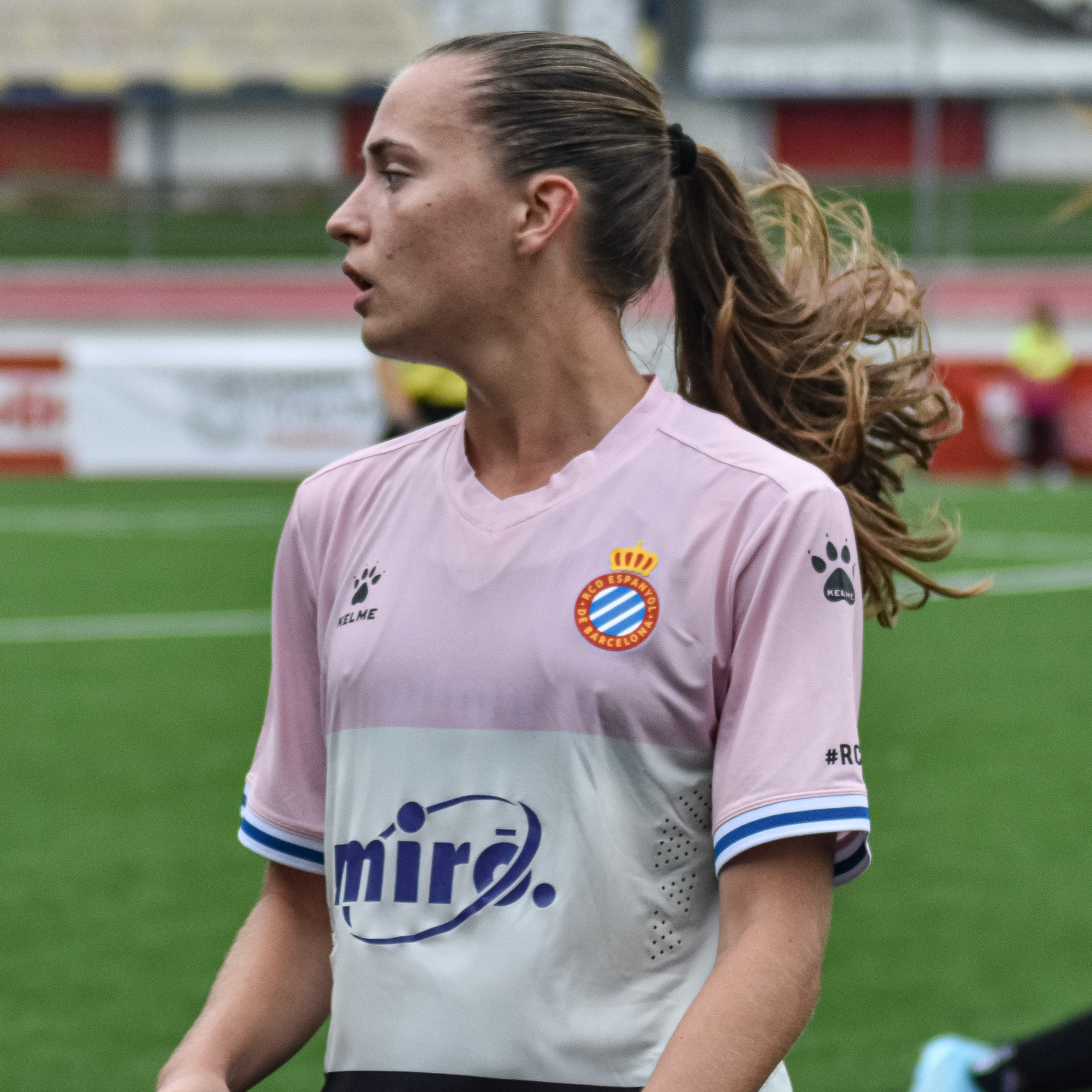 Anna Torrodà Ricart, futbolista del RCD Espanyol, en su encuentro frente al Madrid CFF en septiembre de 2019.